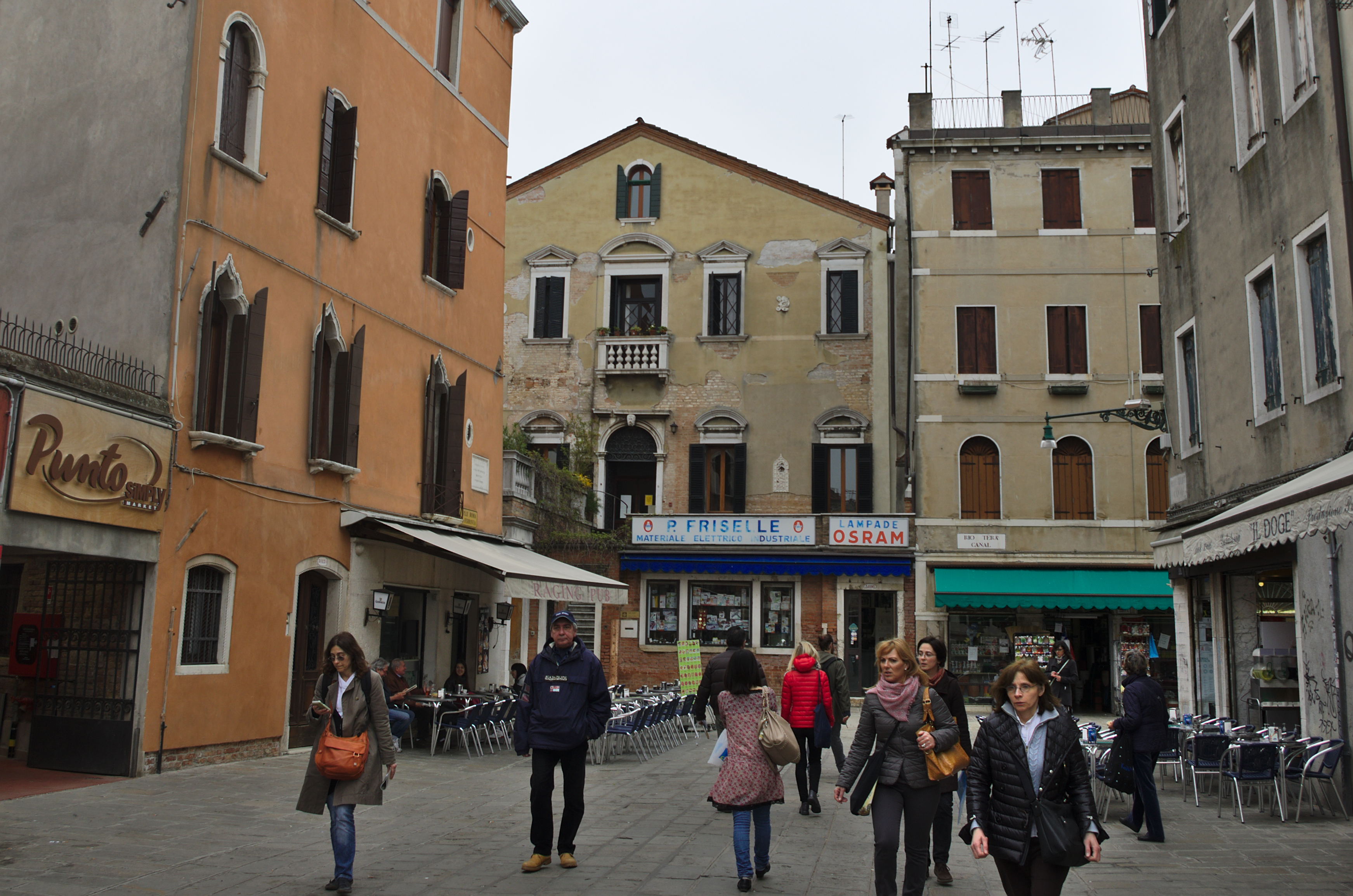 Venise - 20140403